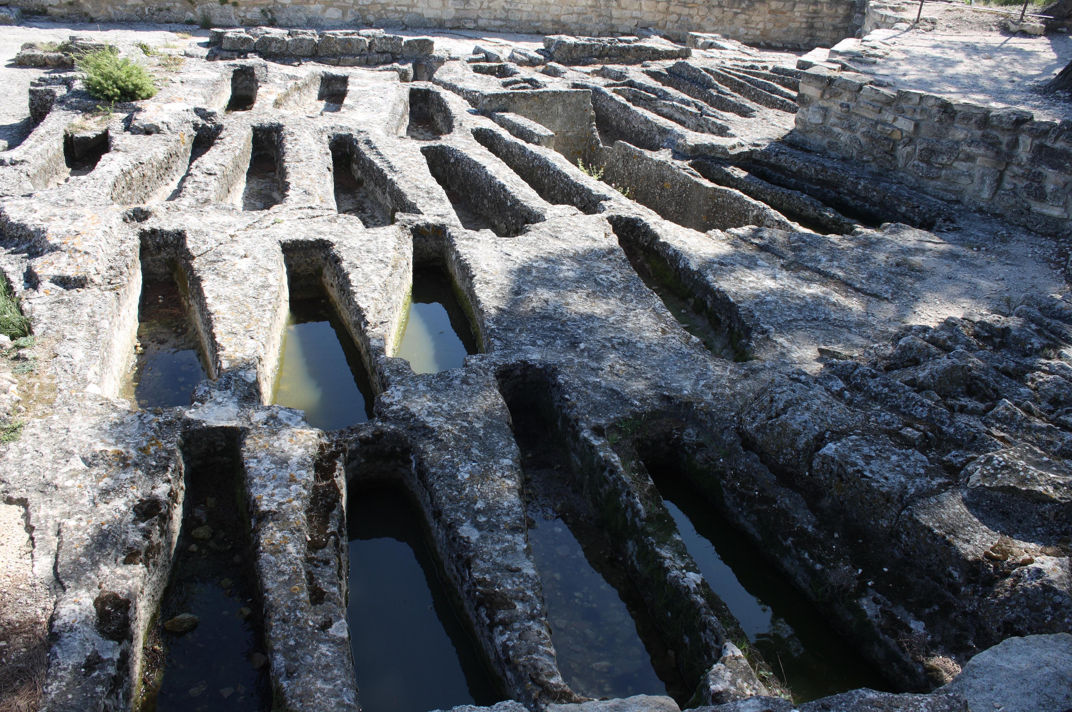 Höhlenkloster Saint-Roman bei Beaucaire, einer Gemeinde im Département Gard in der französischen Region Languedoc-Roussillon, in den Felsen geschlagene Gräber